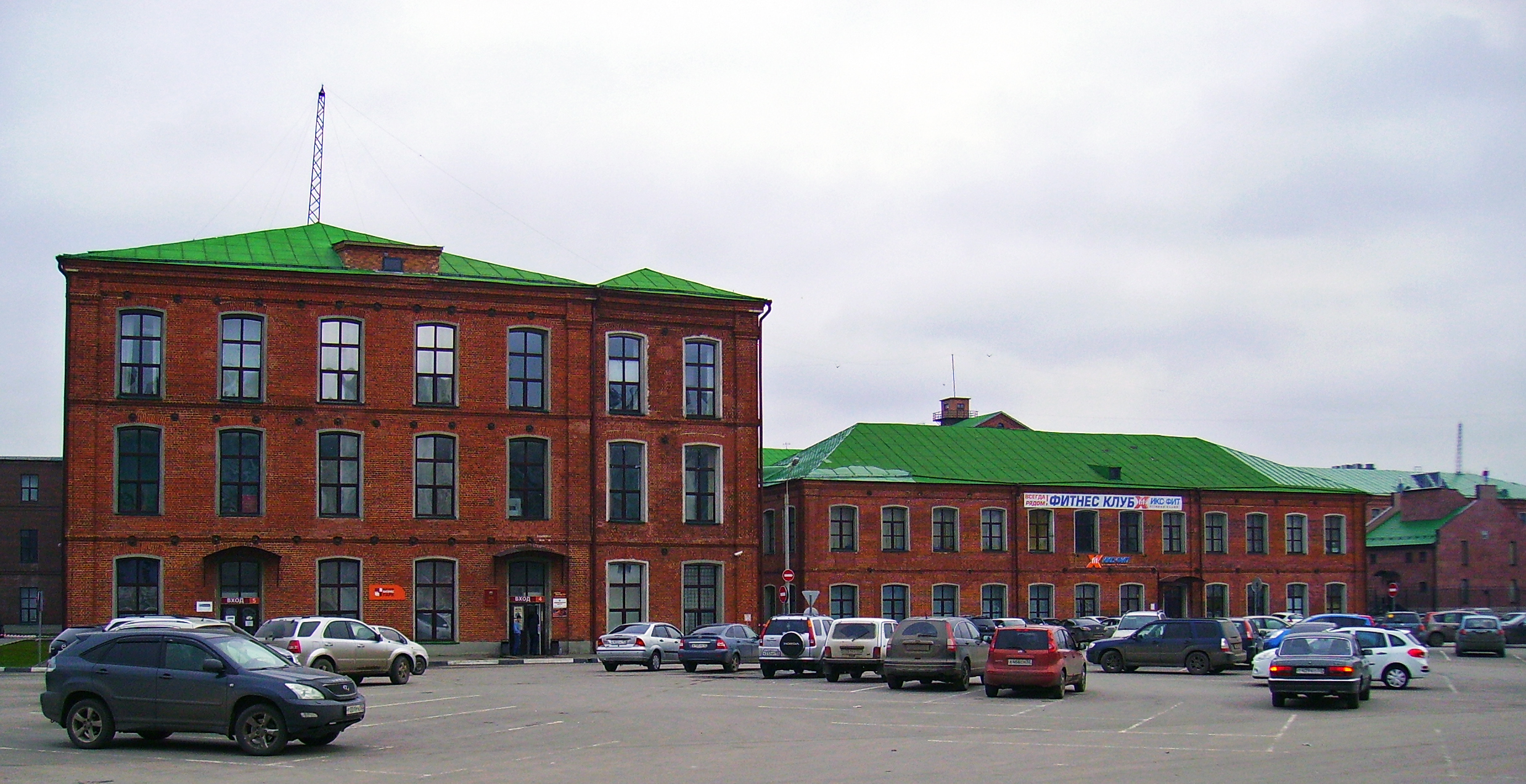 Нижегородская льномануфактура: переулок Мотальный, 6-10, Нижний Новгород, Нижегородская область